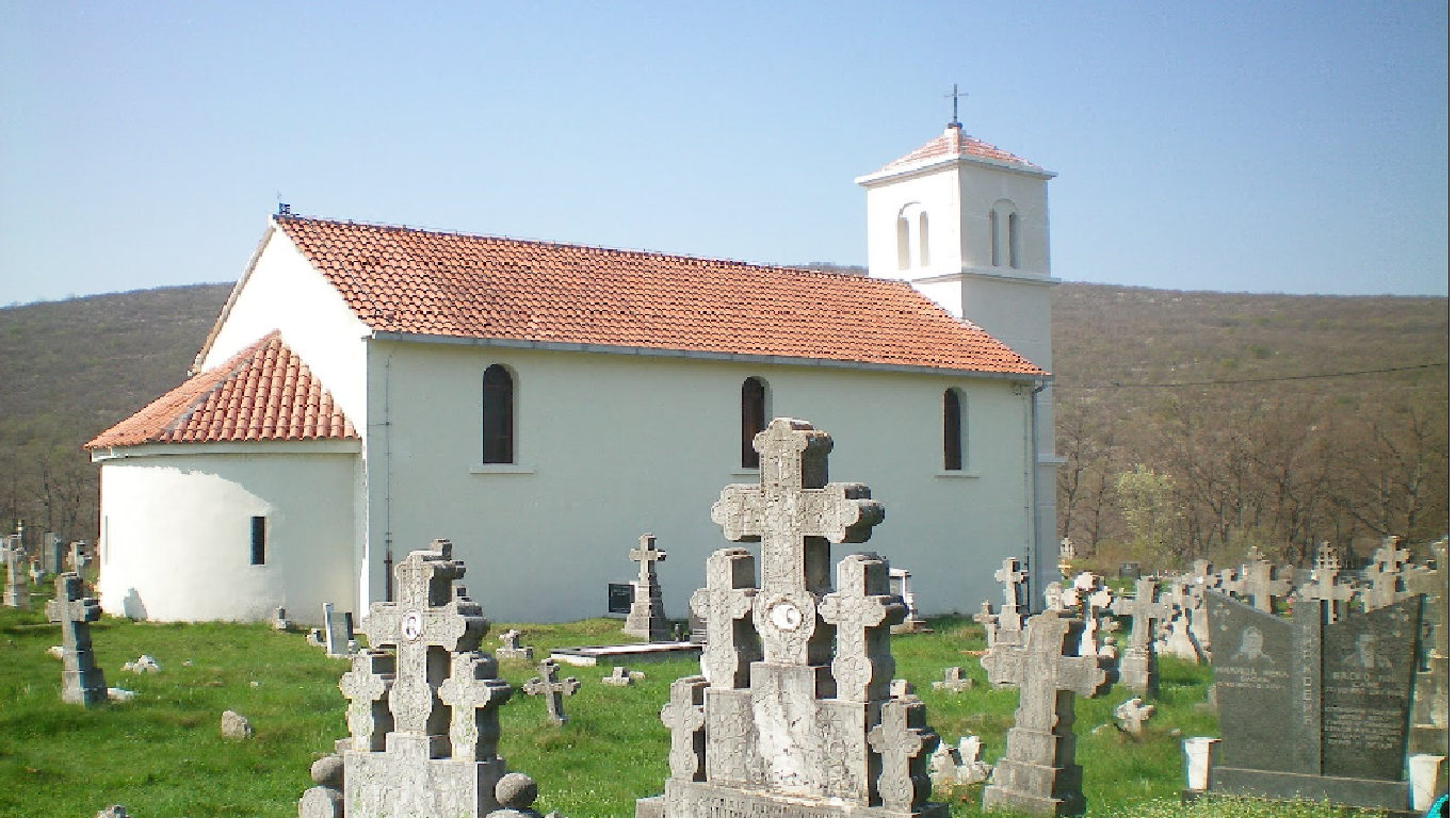 Црква светих апостола Петра и Павла из 1458. године